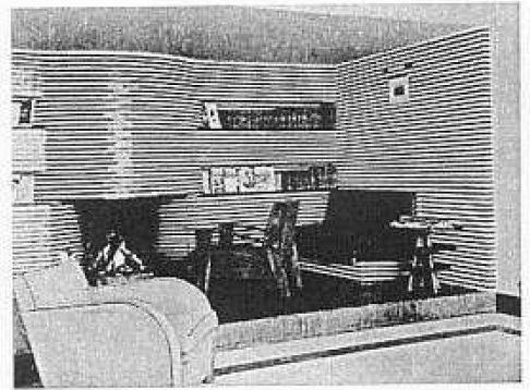 Realizado por Martín Domínguez.